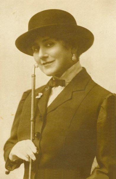 Mattyasovszky Ilona magyar filmszínésznő. Postcard.